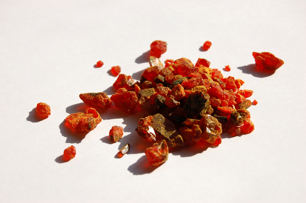 Potassium ferricyanide sample